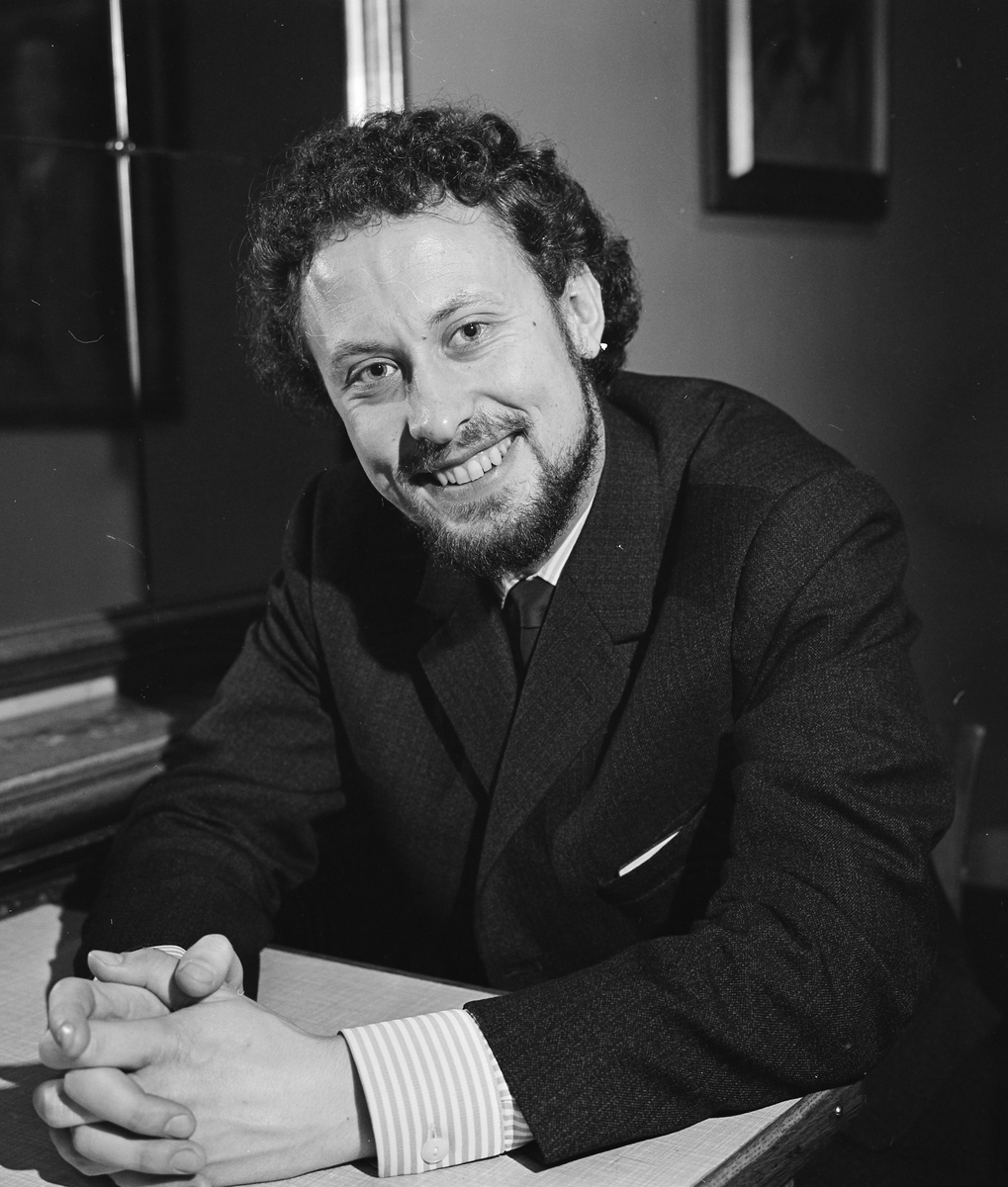 Svein Erik Brodal (født 21. februar 1939 på Østre Toten) er en norsk skuespiller, teaterinstruktør og forfatter.